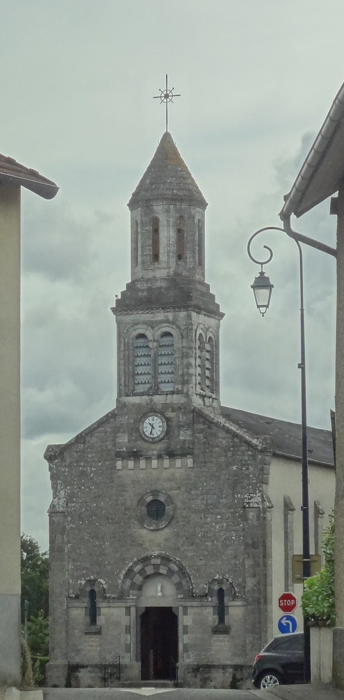 église Saint-Augustin (enterrement ce jour-là, j'ai préféré rester discret)